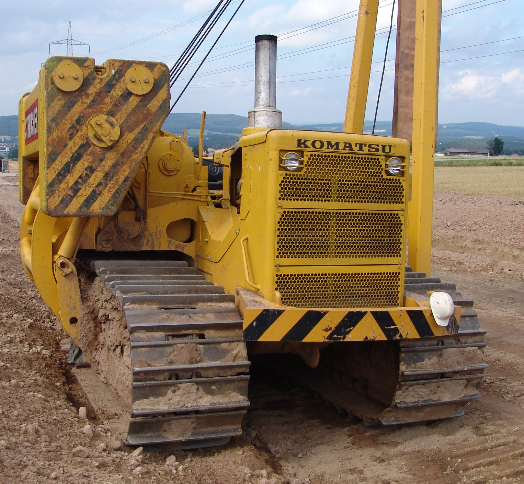 Komatsu Raupenkran